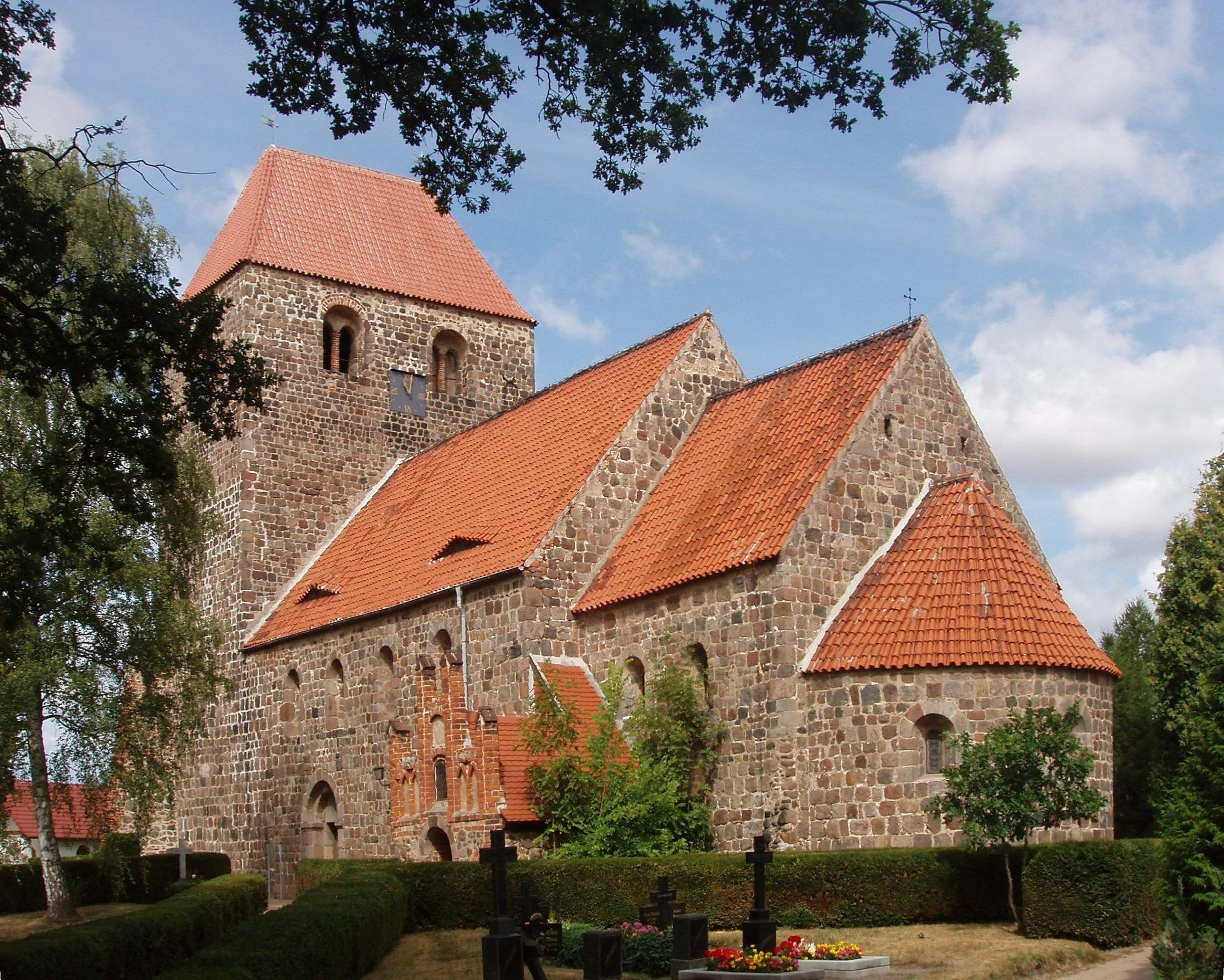 Die spätromanische Kirche St. Leonhard (Ersterwähnung 1201) gehört der Architektur nach zu dem weitverbreiteten, sog. vollständigen Dorfkirchentyp, der durch die Abfolge (von West nach Ost): breiter Turm mit Satteldach, gleichbreites Schiff, eingezogener rechteckiger oder quadratischer Chor und Apsis gekennzeichnet ist. Der Turm hat meterdicke Wände; er diente zugleich als Verteidigungsanlage und Fluchtstätte. In der langen Zeit des Bestehens der Kirche gab es auch bauliche Veränderungen, so trägt der Turm jetzt ein Walmdach.